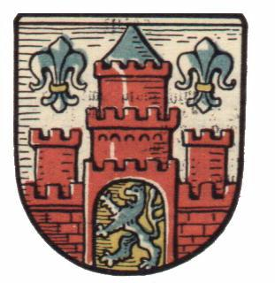 Wappen der Stadt Harburg-Wilhelmsburg 1927 bis 1937